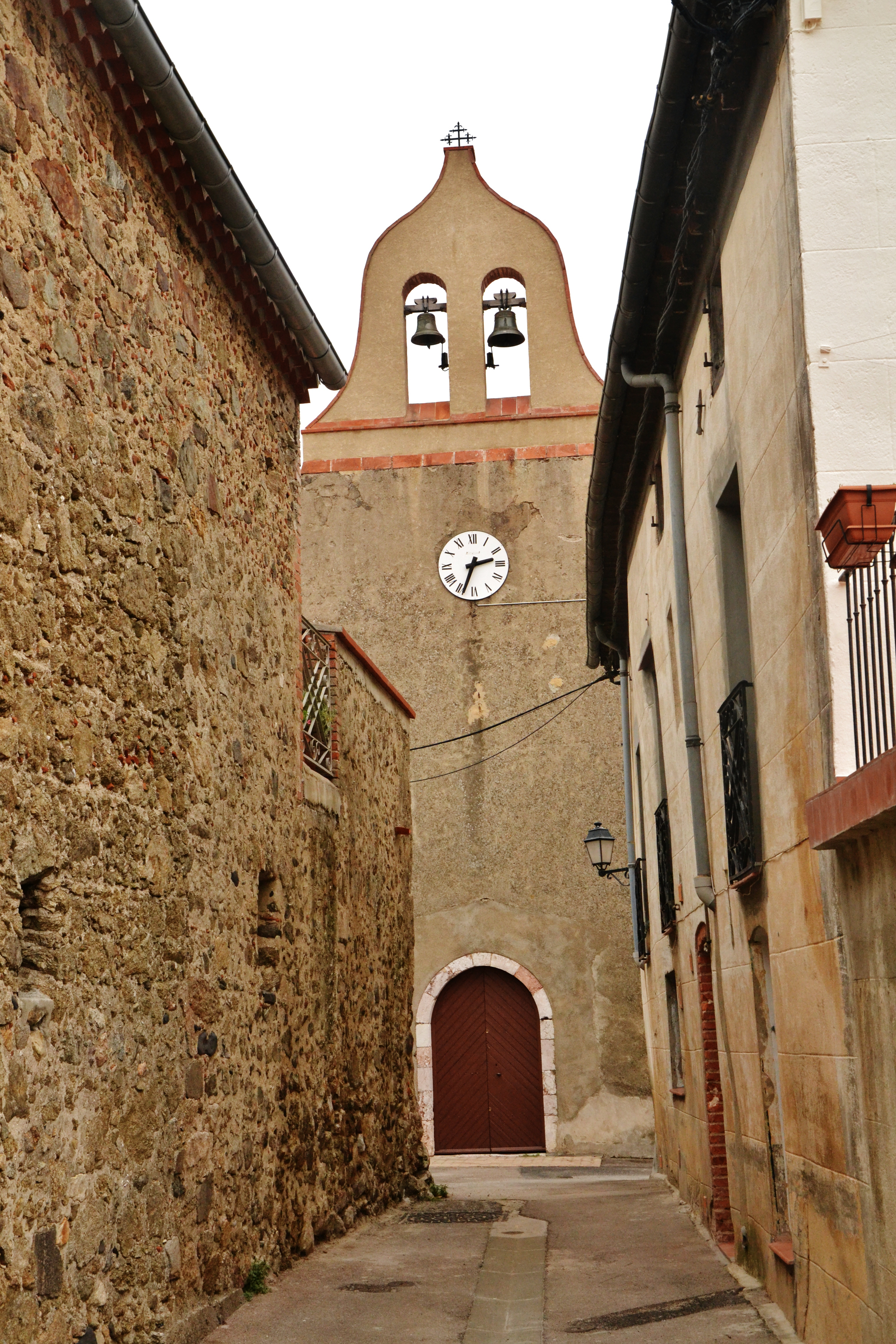 L'église d'Ansignan (Pyrénées-Orientales, France)